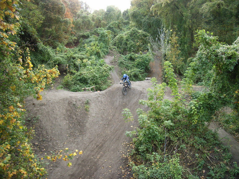 Downhill Trail am Nordost-Hang des Teufelsberges.